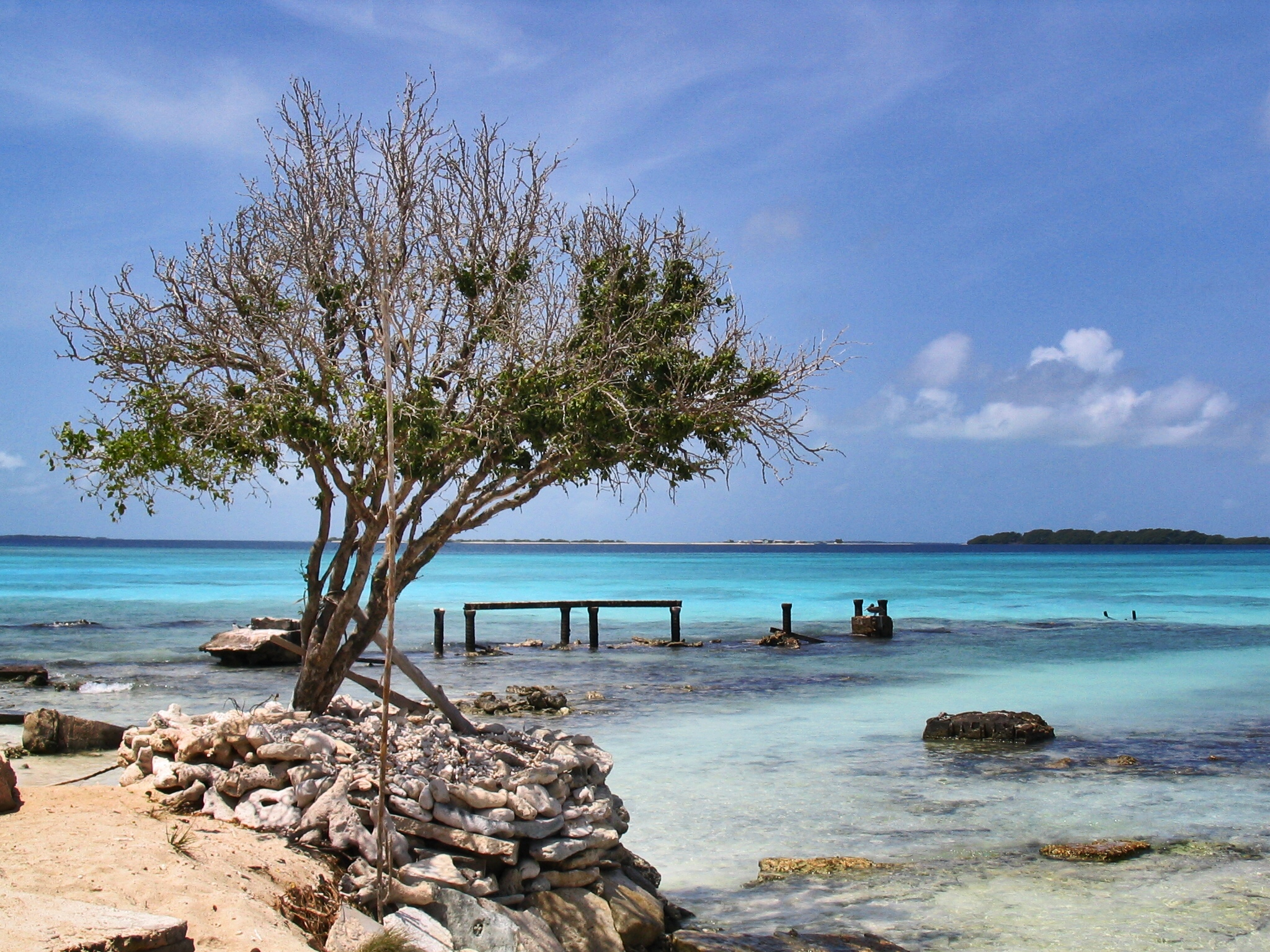 Archipiélago Los Roques, Venezuela